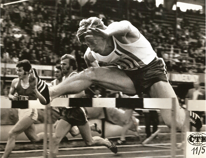 Finále 110 m př., Československá univerziáda 1973, Banska Bystrica